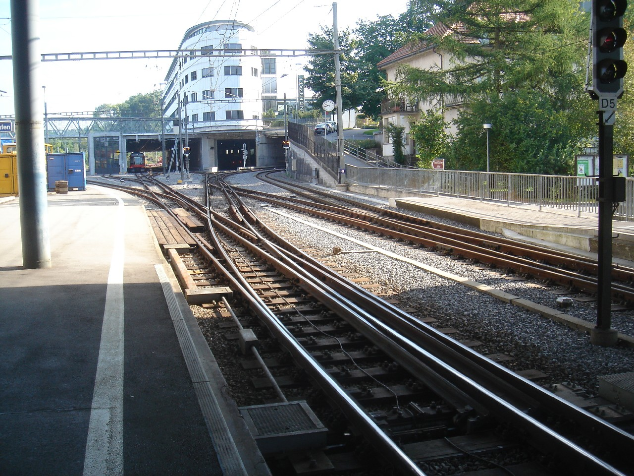 RBS Gleisanlage in Worblaufen; links von Zollikofen, rechts Richtung Papiermühle, ein Gleis ist mit dritter (Normalspur-) Schiene für den Güterverkehr ausgerüstet. Zwischen den Schienen sieht man das Kabel des Linienleiters der Zugsicherung ZSL-90